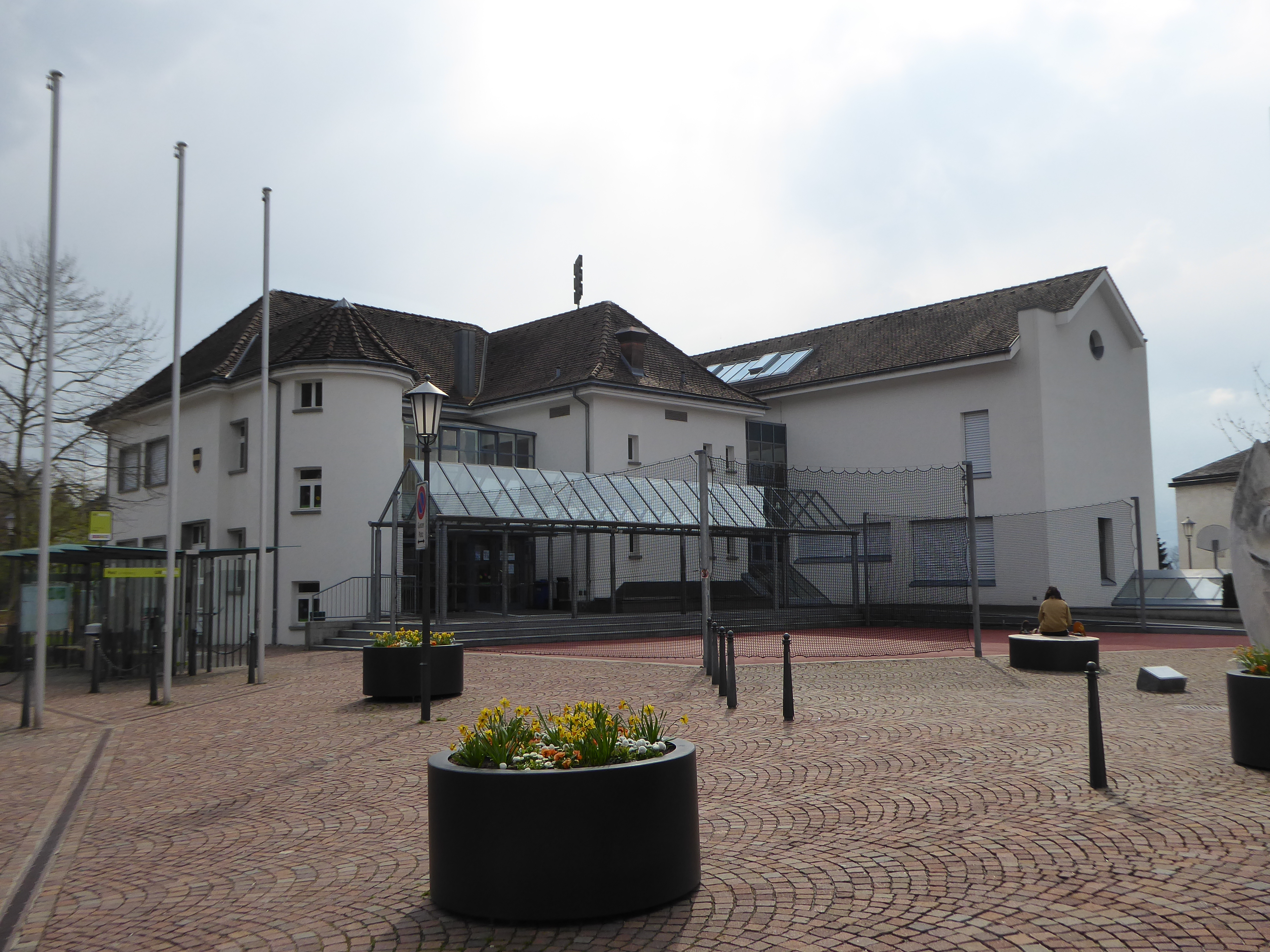 Schellenberg Schulhaus